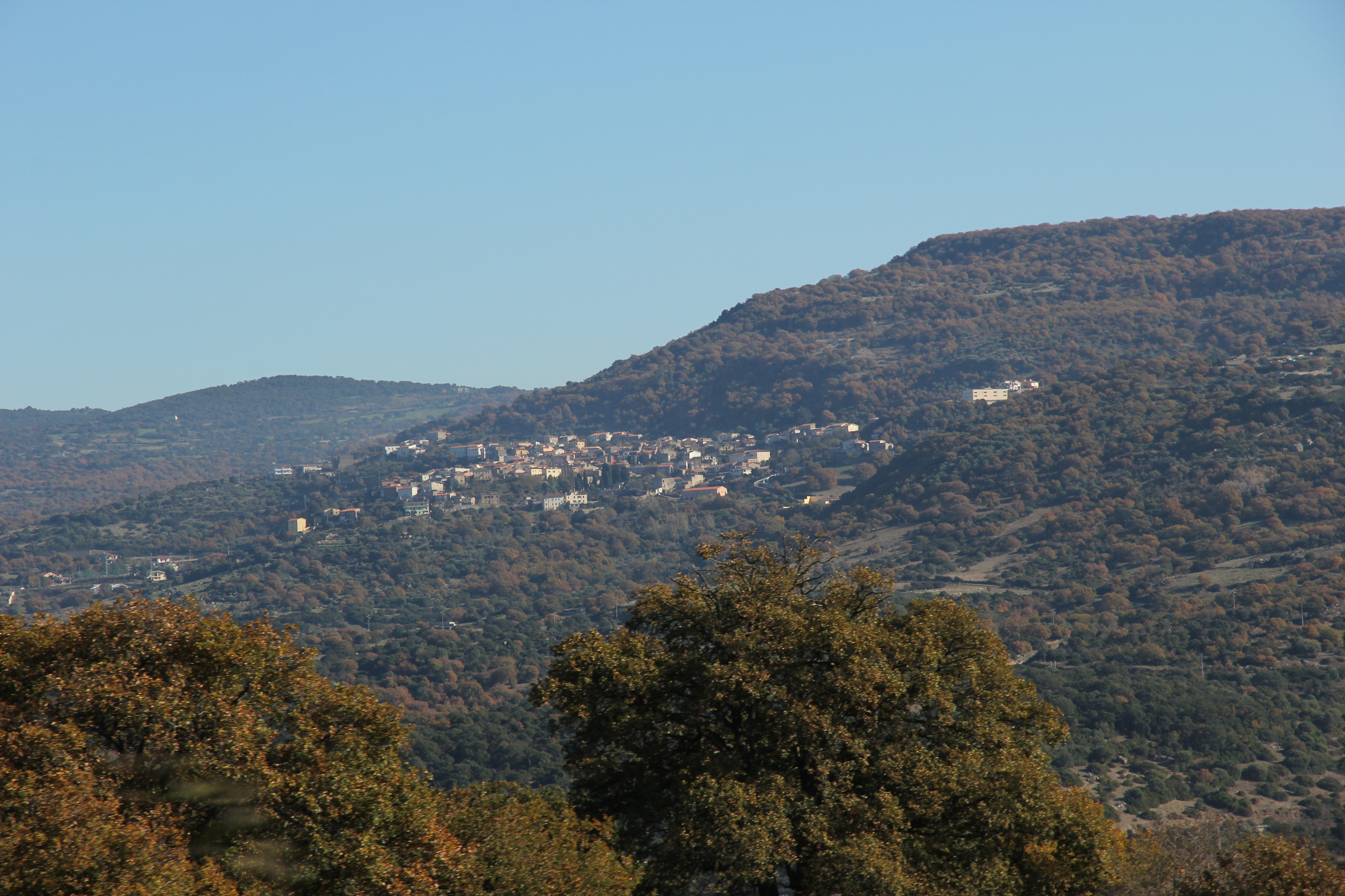 Panorama